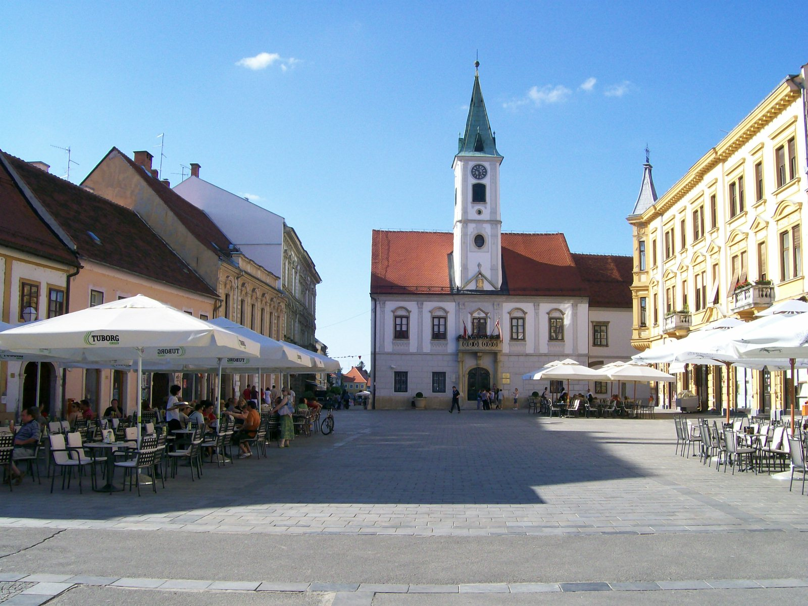 Varaždinski Korzo